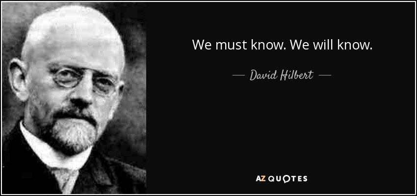 Câu nói của Hilbert